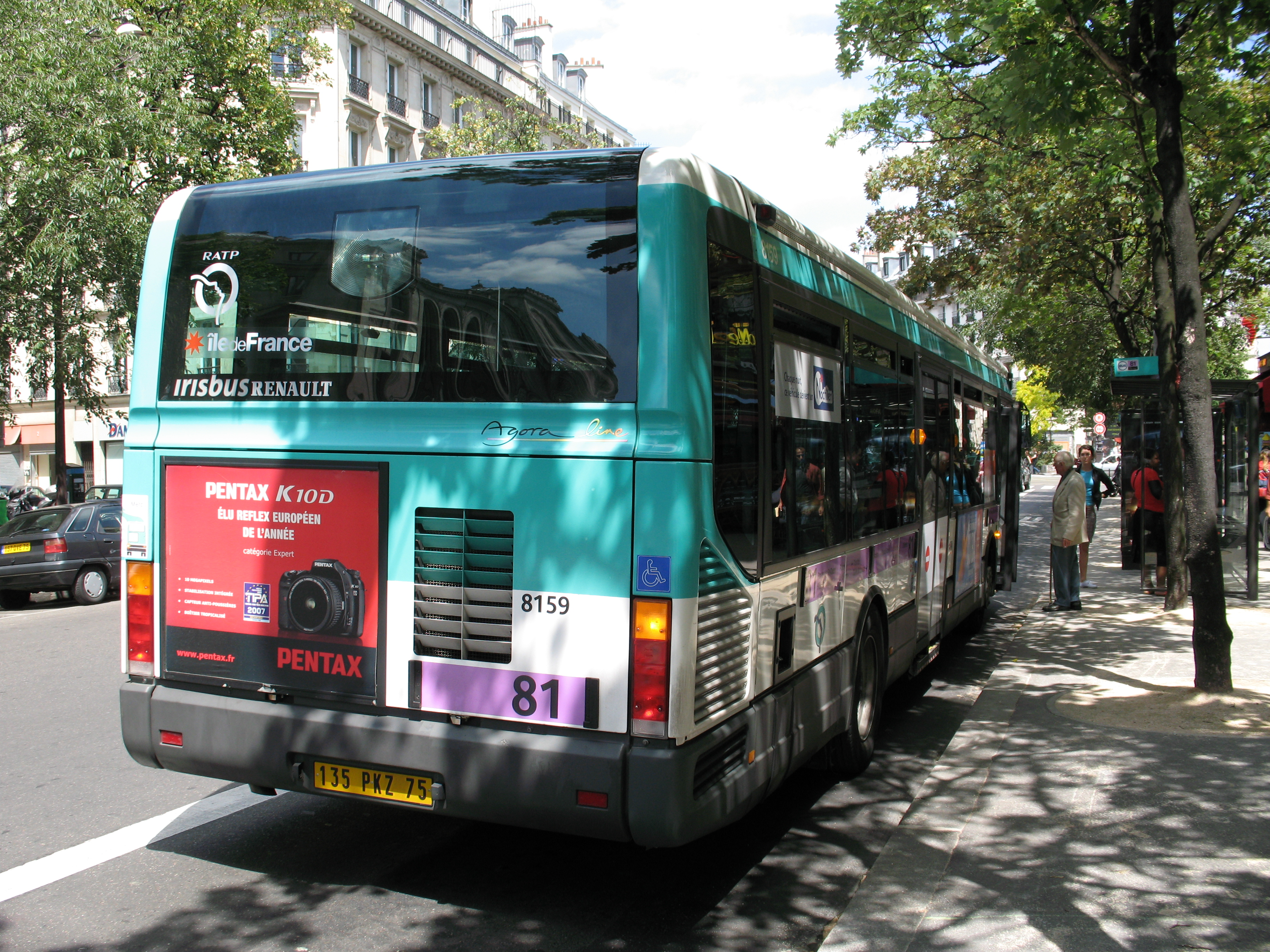 Bus RATP sur la ligne 81 à Châtelet